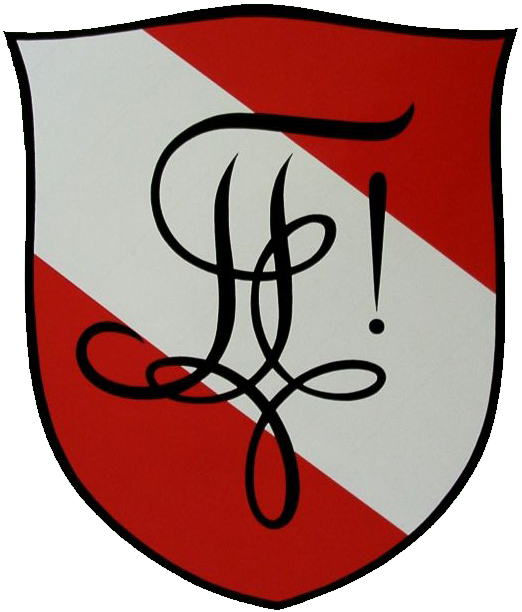 Wappen des Schweizerischen Zofingervereins (Zofingia)